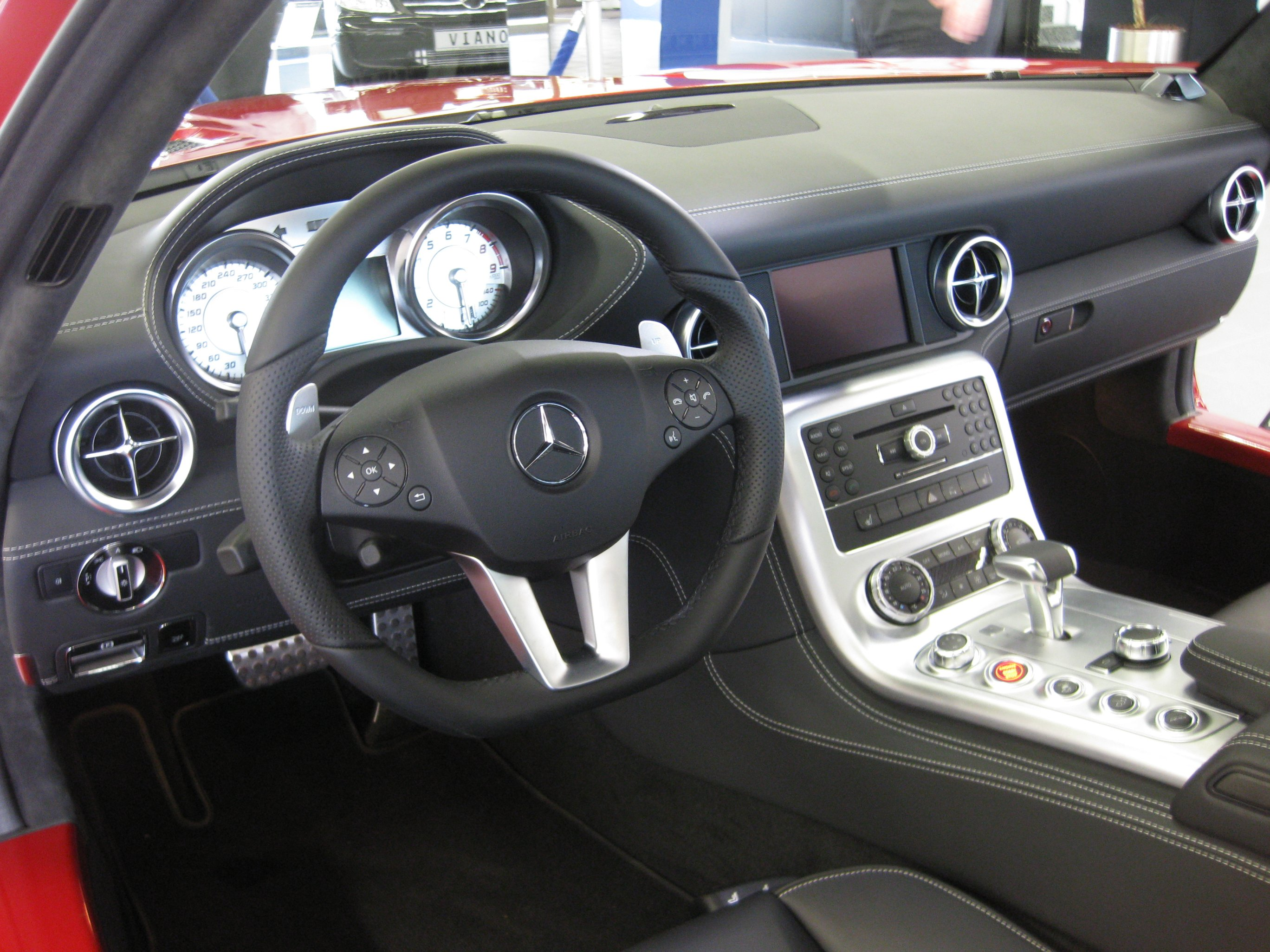 Blick auf das Cockpit des SLS AMG